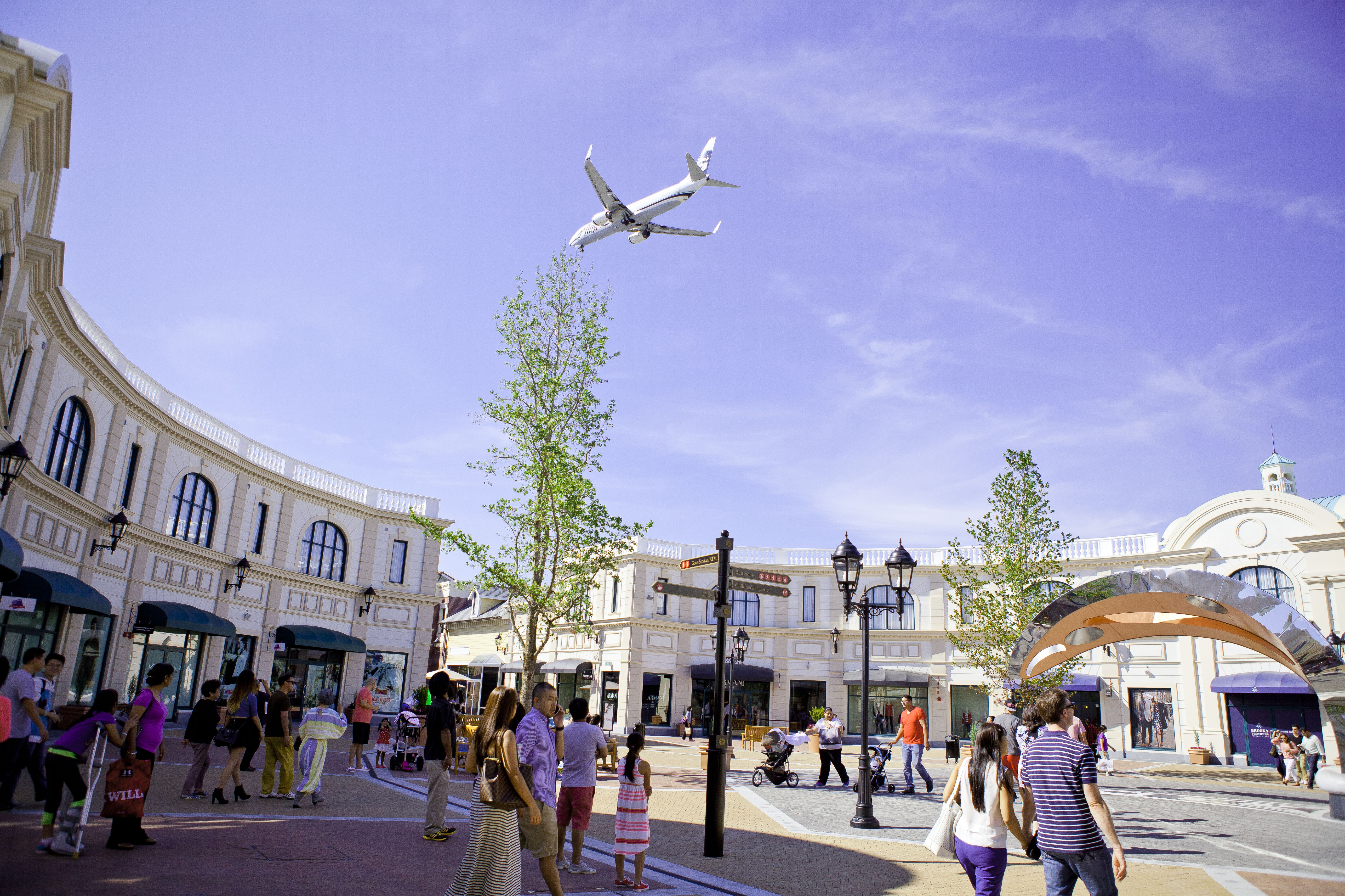 McArthurGlen Designer Outlet Vancouver Airport